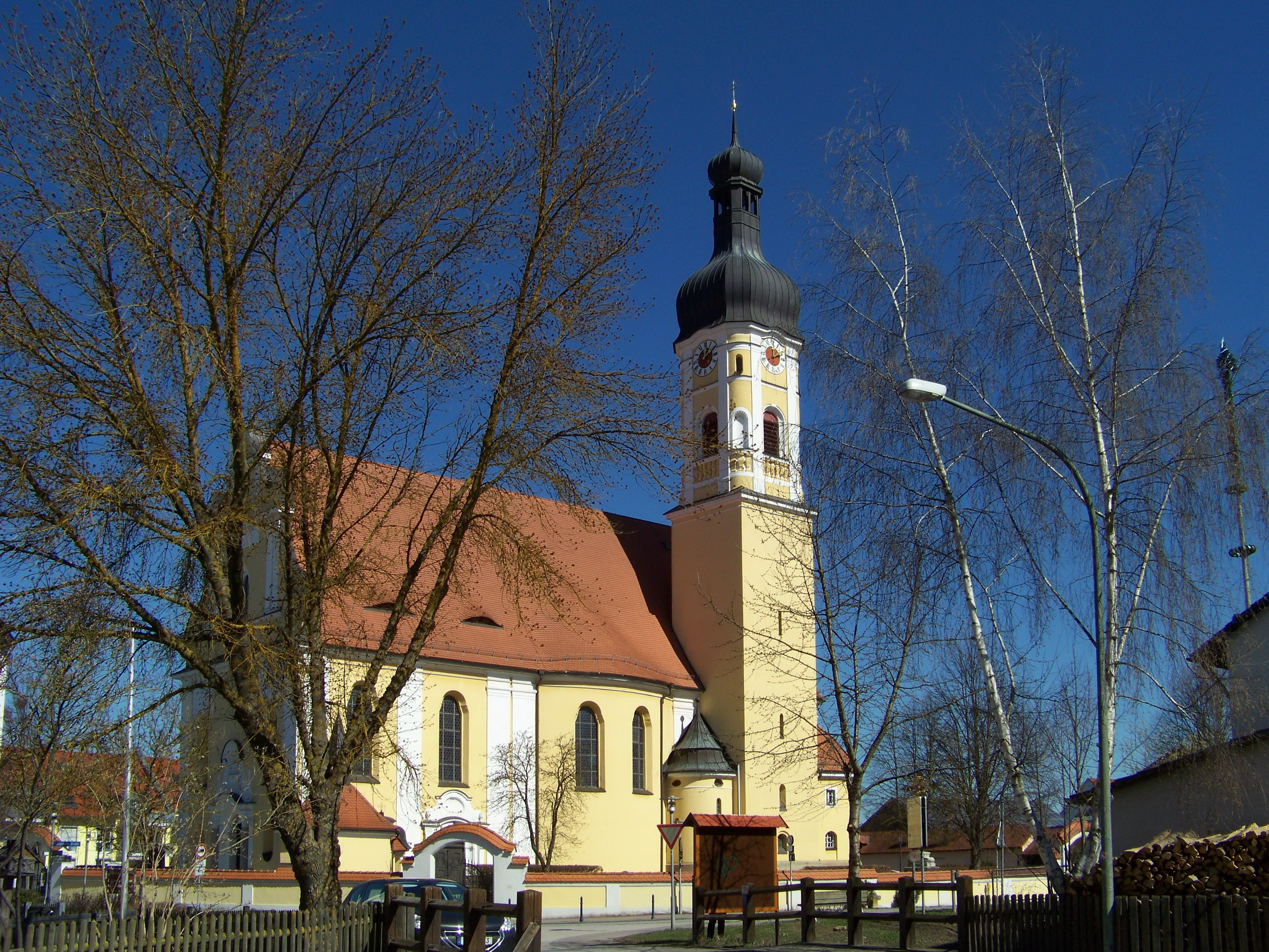 Obertraubling, Sankt-Georg-Straße 1. Kath. Pfarrkirche St. Georg. Saalbau mit eingezogenem Chor, Schweifgiebel, südlichem Chorflankenturm mit Haubendach und Putzgliederungen, neubarock, 1907-09 von Johann Baptist Schott; mit Ausstattung.